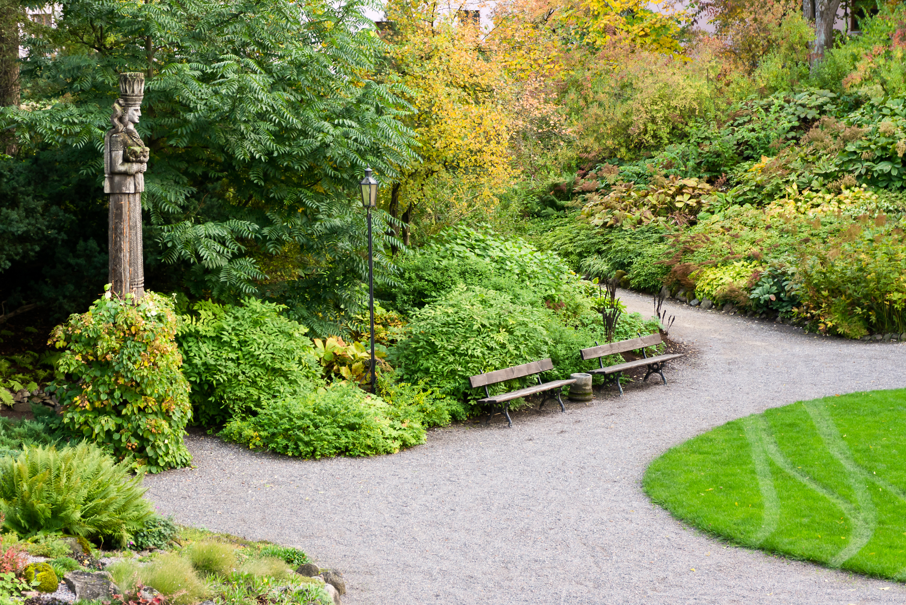 Tartu Ülikooli Botaanikaaed. Vasakul servas ülikoolile 350. aastapäevaks kingitud Leedu puuskulptuur